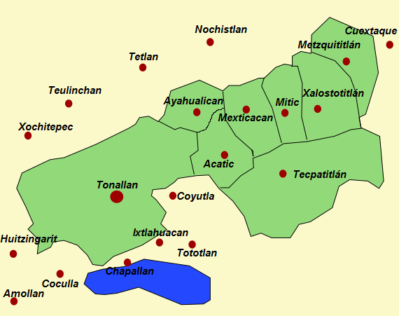 Imagen de la antigua división territorial de los pueblos originarios de una zona de México comprendida entre Zacatecas y Guadalajara, los señoríos tecuexes están resaltados en verde.